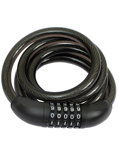 Велосипедный замок АЛЛЮР ВС-Т12К